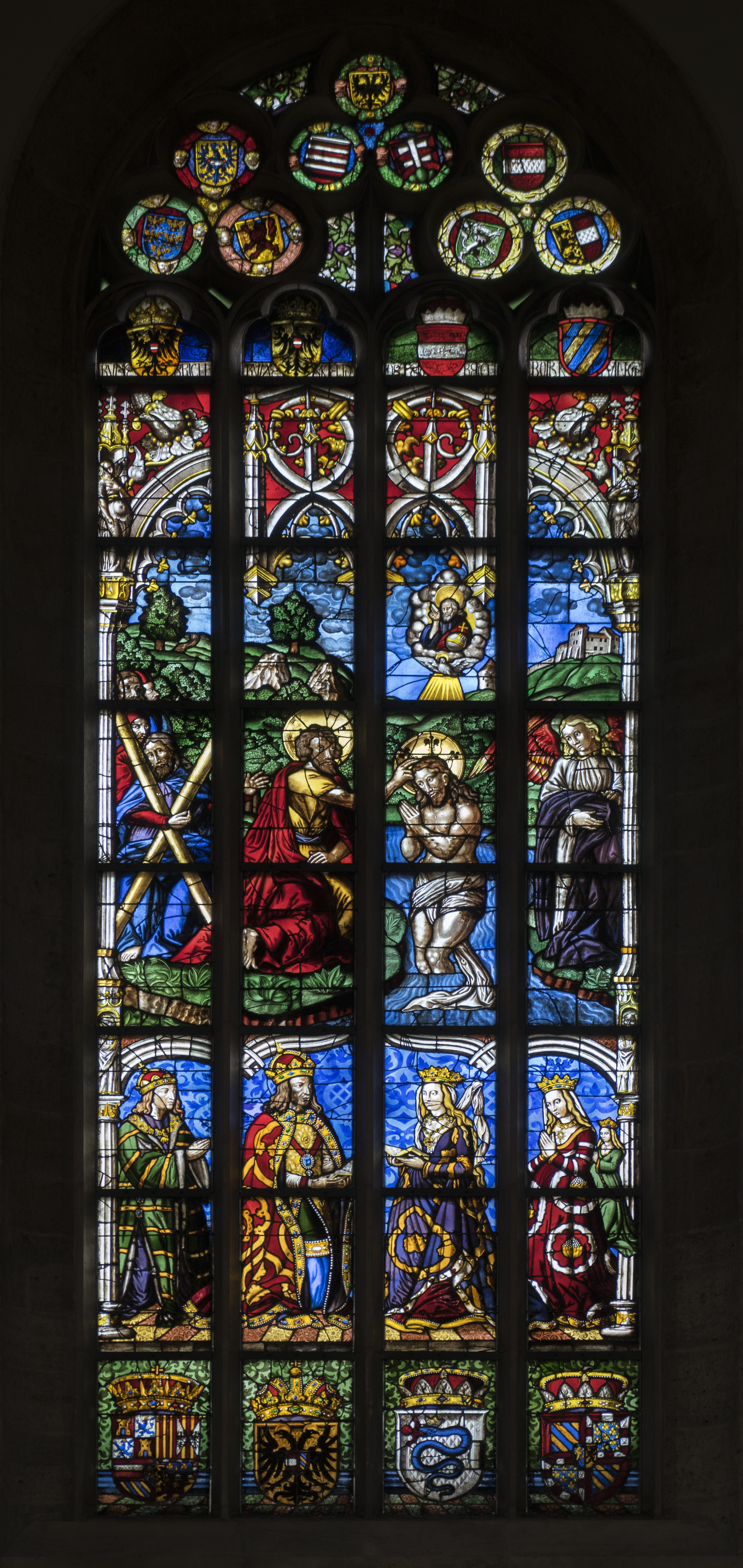 Wiener Neustadt – Theresianische Militärakademie. Ca. 500 Jahre altes Fenster mit Motiven zu Maximilan I. Philipp der Schöne, König von Spanien (Sohn Maximilians und Marias von Burgund), Kaiser Maximilian I., dessen zweite Gemahlin Bianca Maria Sforza von Mailand, neben ihr die erste Gemahlin Maria von Burgund Dieses Bild wurde anlässlich des österreichischen Tags des Denkmals 2017 in Niederösterreich eingereicht. Diese Datei wurde im Rahmen von WikiDaheim 2017 in Österreich erstellt und hochgeladen.Sie wurde dem Themenbereich Denkmalschutz zugeordnet.